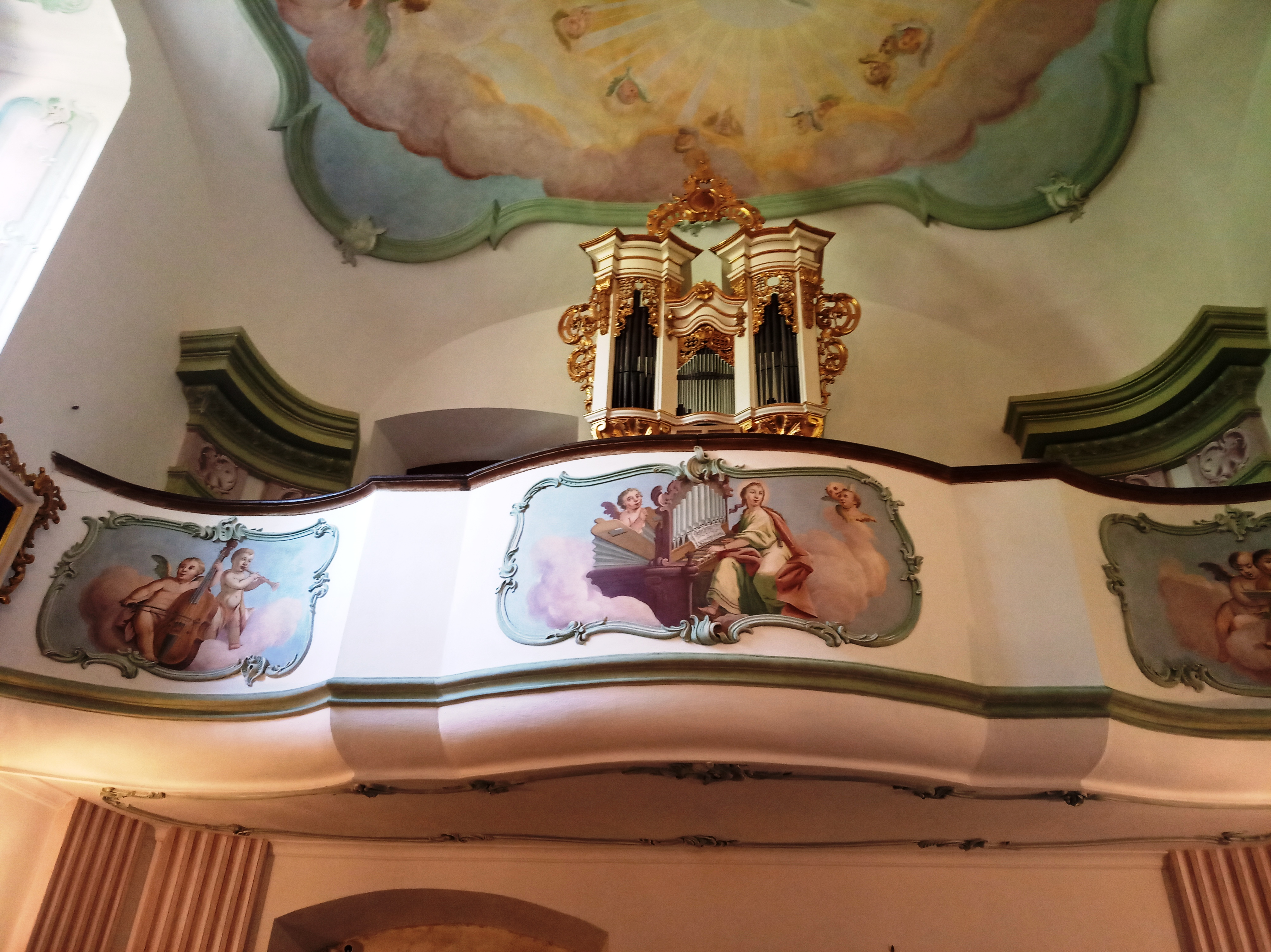 Varhany v zámecké kapli ve Stekníku z roku 1782 z dílny nepomyšlského varhanáře Ferdinanda Müllera. Na průčelí kruchty obraz sv. Cecílie.